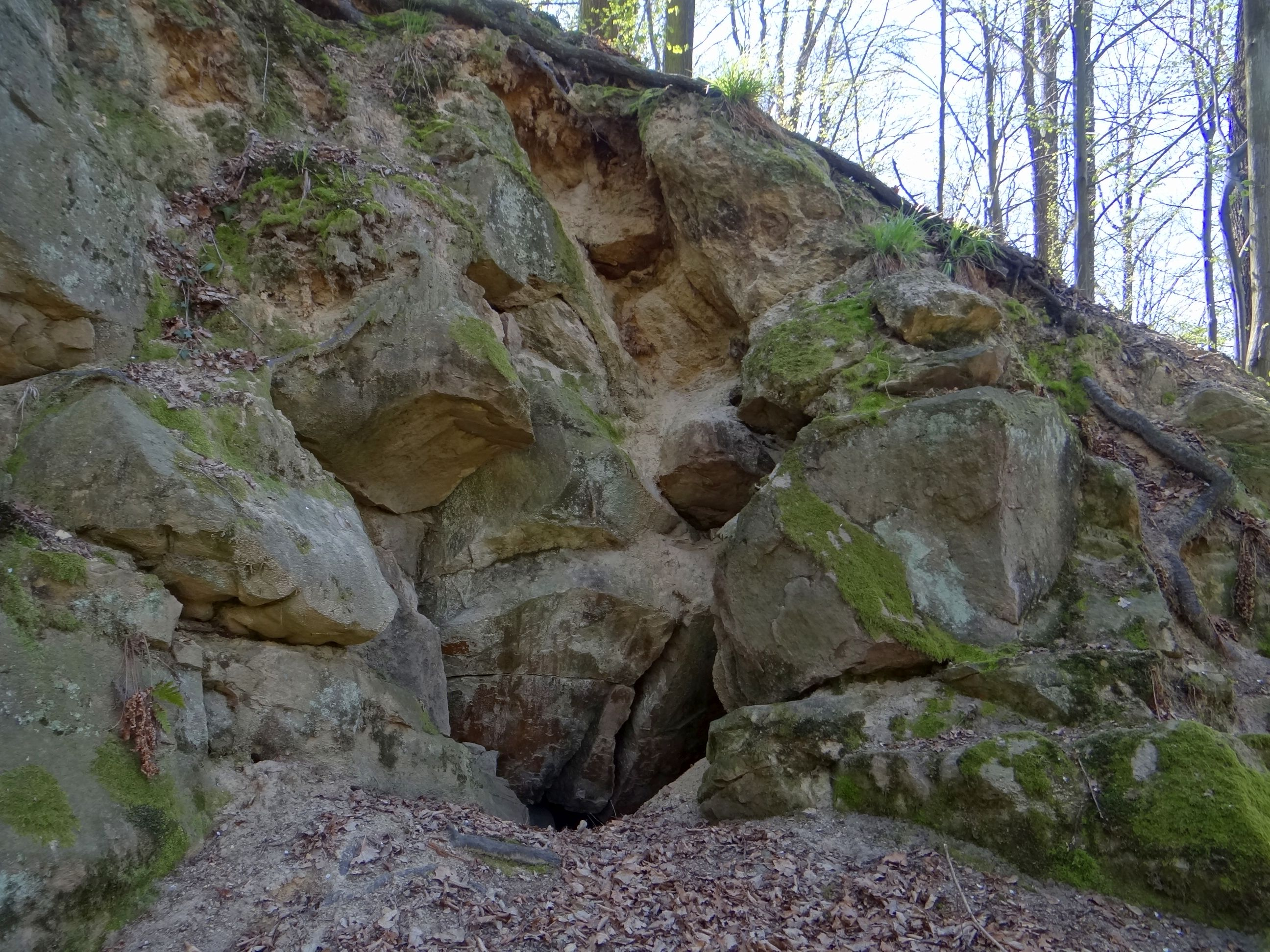 Jaskinia w Ciężkowicach I